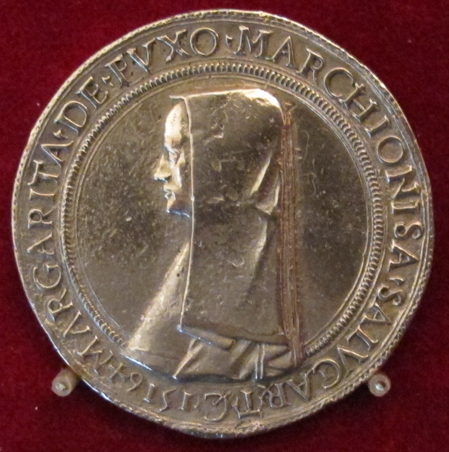 Savoia, margherita de foix, marchesa di saluzzo, 1516